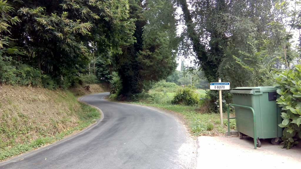 Acceso a O Busto, Curtis.